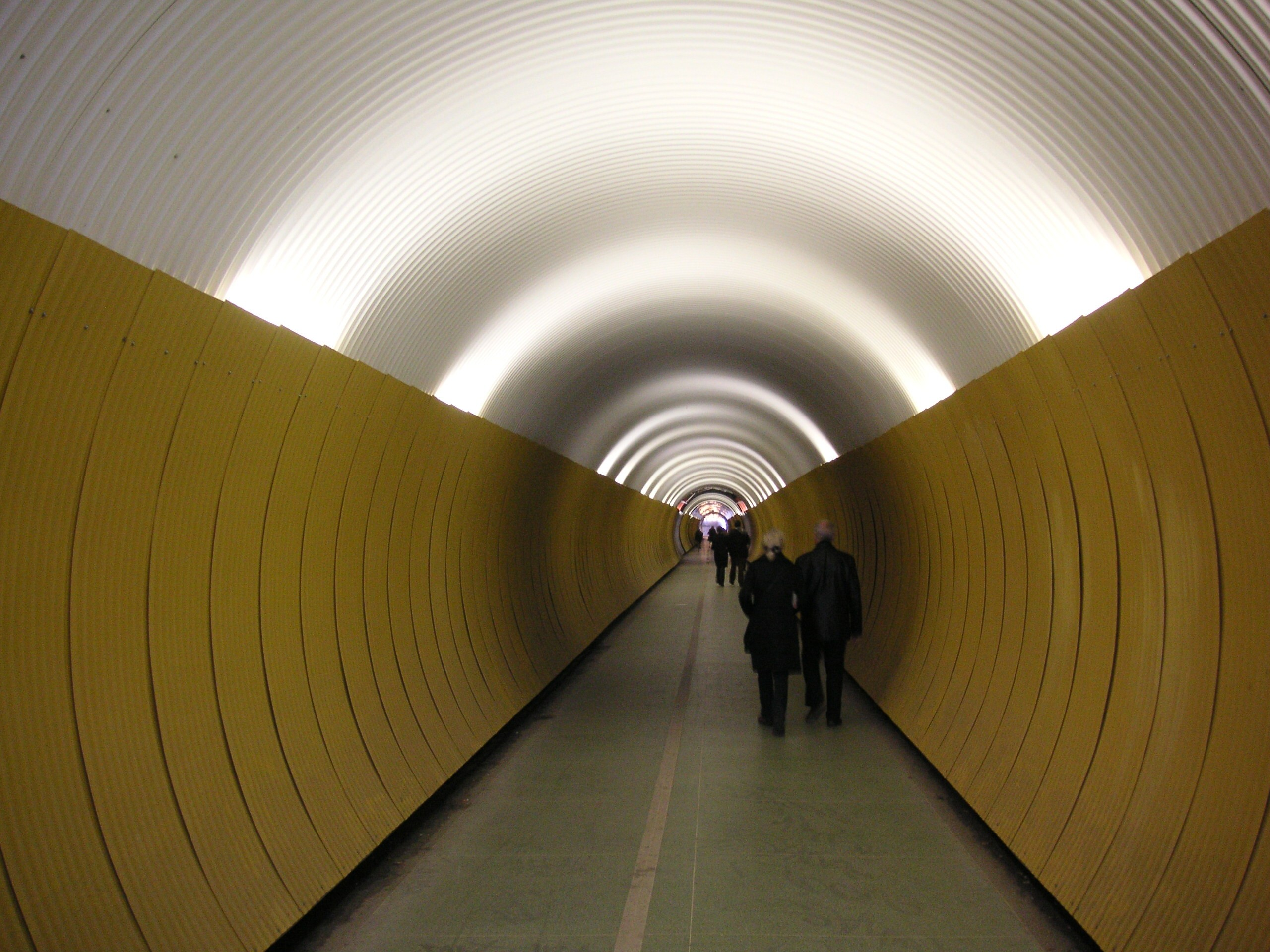 Brunkebergstunneln i Stockholm